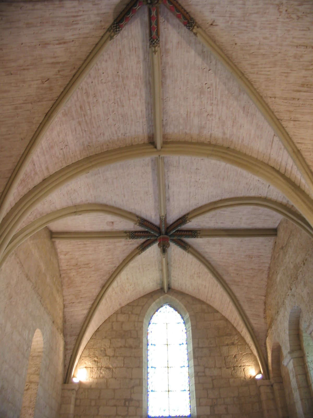 Croisée d'ogives dans l'église de Saint-Georges d'Oléron (17). Je suis l'auteur du cliché pris en aoû»t 2006